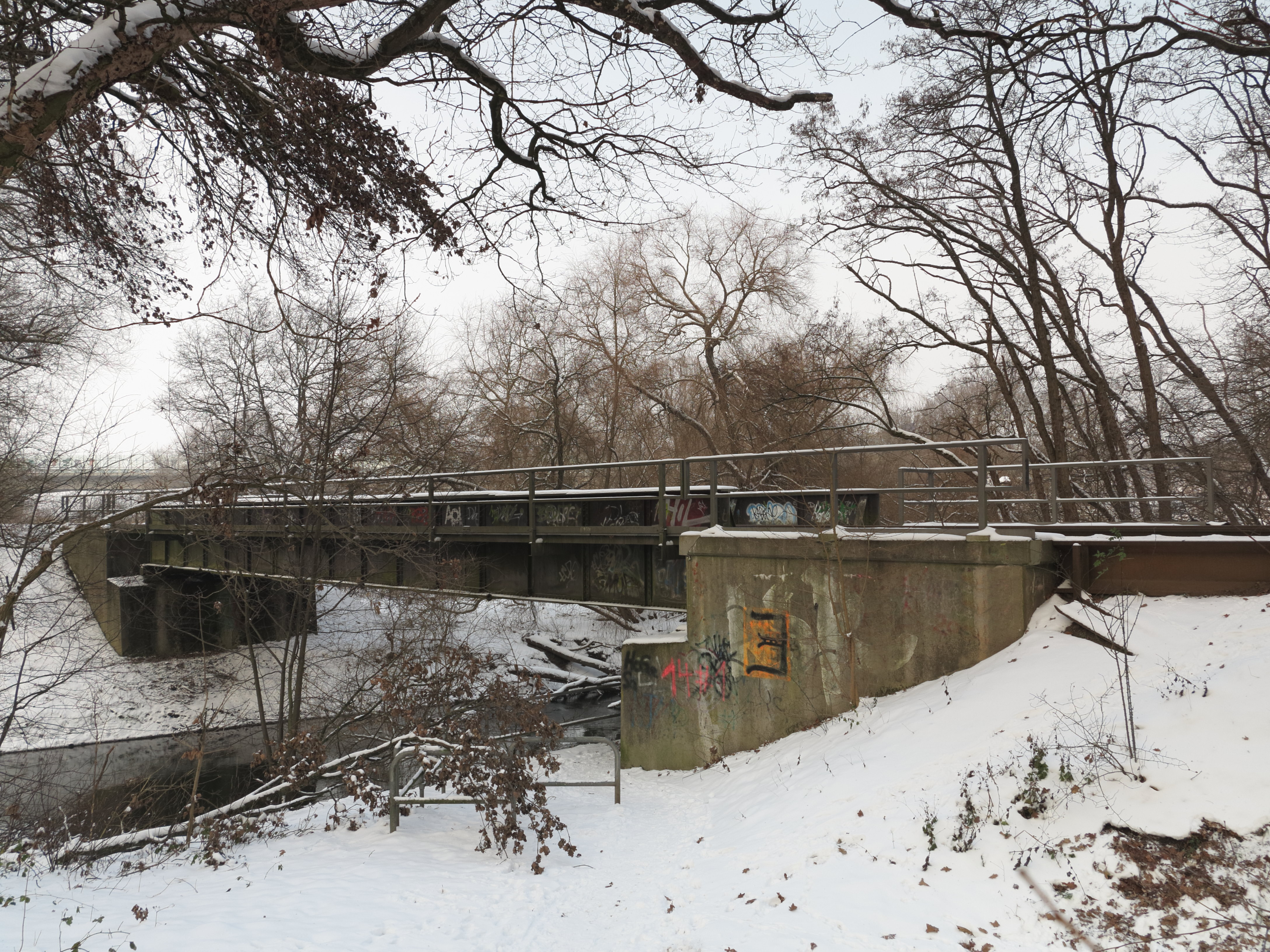 Braunschweig: Die Eisenbahnbrücke, die das Industriegleis zum Abfallentsorgungszentrum Watenbüttel über die Oker führt.